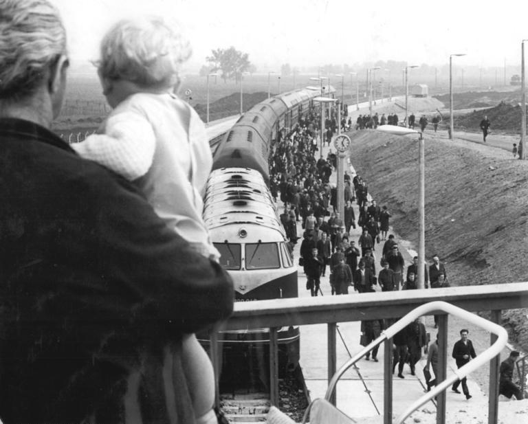 Zentralbild / Sturm / 7.6.1967 / Halle-Neustadt: Vom Werden einer neuen Stadt Der neue Bahnhof in Halle-Neustadt. Berufsverkehr aus Buna und Leuna. Täglich wächst die neue Stadt, das größte Wohnungsbauvorhaben in Mitteleuropa. Die Chemiearbeiterstadt ist ein riesiger Bauplatz, auf dem aber schon das Leben der Einwohner pulsiert. Jetzt, 21 Monate nach dem Einzug der ersten Mieter und 34 Monate nach der Grundsteinlegung, aber schon rund 2500 Familien eine neue, moderne Wohnung bezogen. Bereits heute, in der ersten Phase des Aufbaus der künftigen Heimat von mindestens 70000 Menschen, sind die wichtigsten Einrichtungen zur Versorgung der Einwohner in Betrieb. Die größte Kaufhalle der DDR steht in der Chemiearbeiterstadt, in fünf Kindergärten und fünf Kinderkrippen werden die jüngsten Bürger der Stadt liebevoll betreut. Das Durchschnittsalter der Werktätigen von Halle-Neustadt beträgt 23 Jahre.